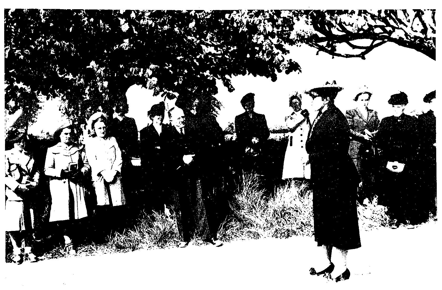 Discours de la ministre MRP de la Santé publique et de la Population Germaine Poinso-Chapuis du gouvernement Robert Schuman 1 à Flottemanville début 1948